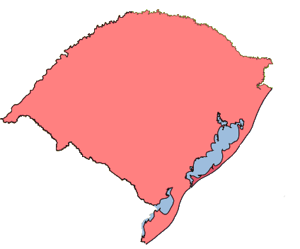 Mapa do Rio Grande do Sul sem as divisas